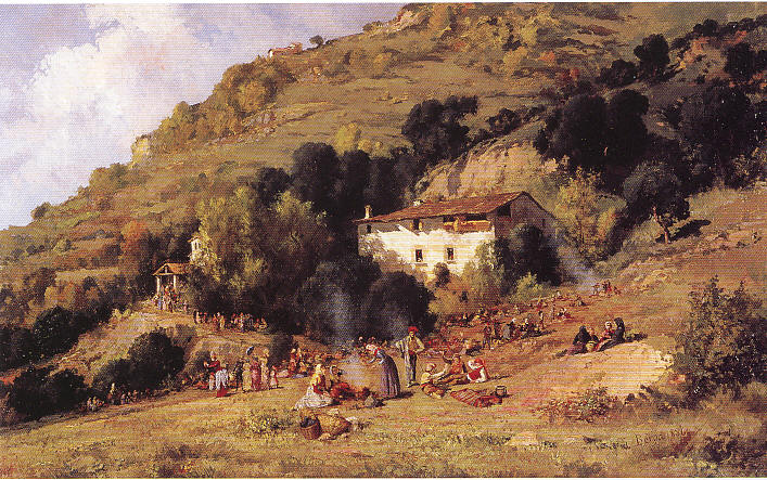 La romería